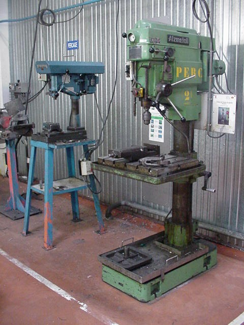 Colonn drill